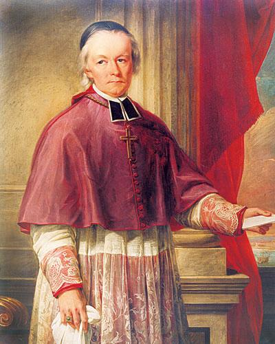 Jean-Jacques Lartigue, premier évêque de Montréal. Jean-Jacques Lartigue (20 juin 1777 à Montréal- 19 avril 1840 à Montréal) était un ecclésiastique canadien qui joua un grand rôle politique lors de la rébellion des Patriotes.